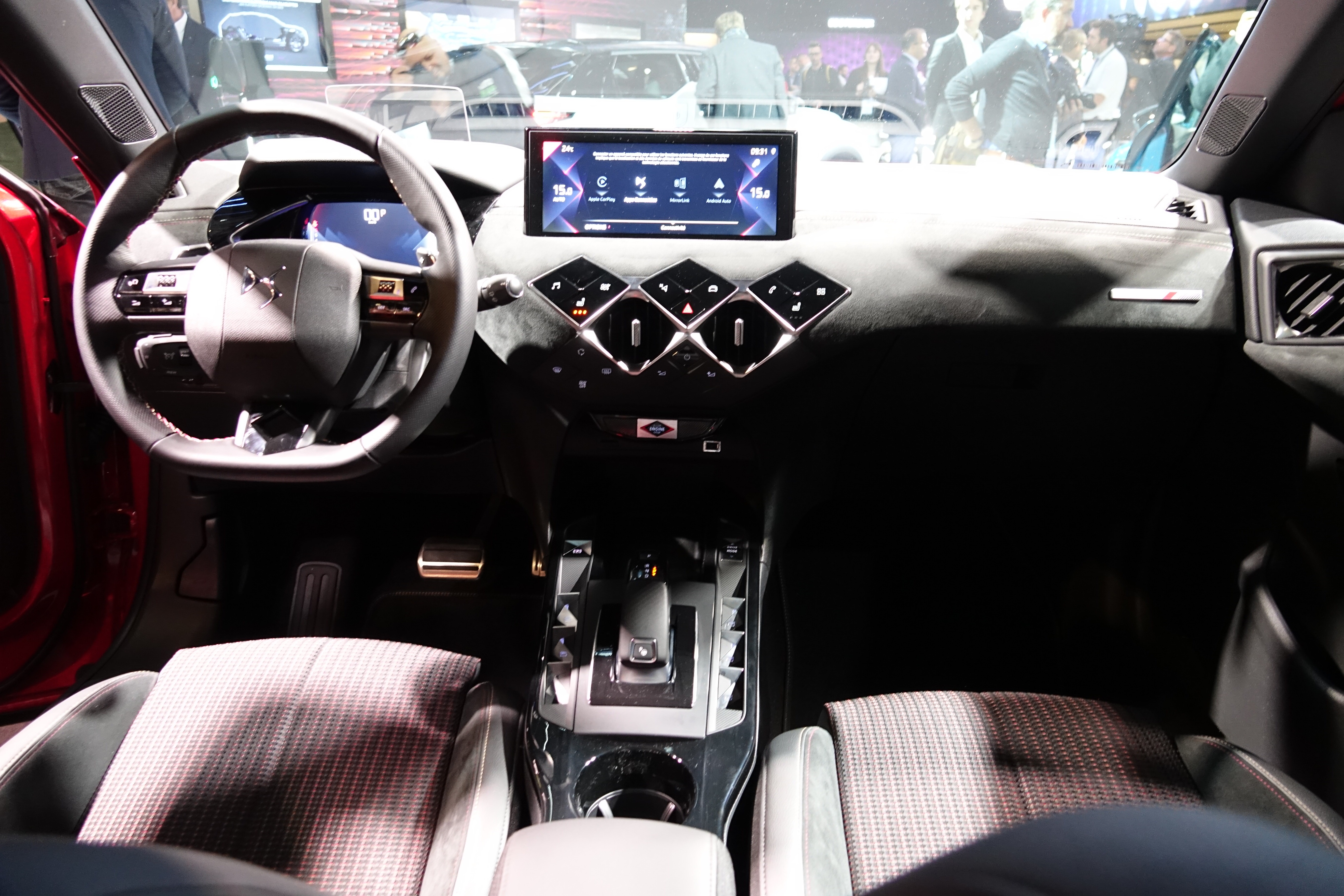 DS 3 Crossback - Mondial de l'Auto 2018